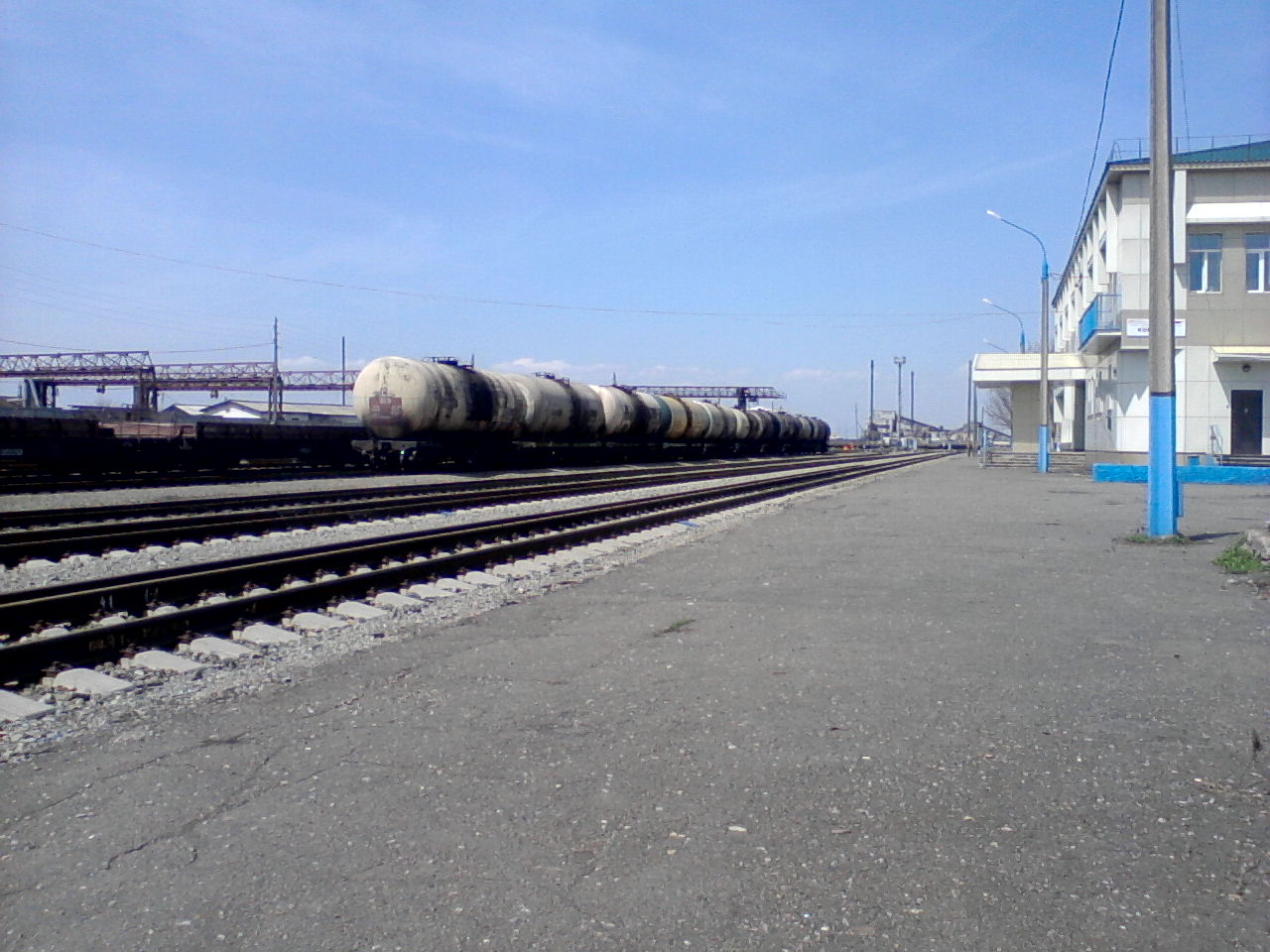 ロシア語版wikipediaよりCC0 1.0 Universal (CC0 1.0) Public Domain Dedication で公開されているもの。 撮影者：Сталкер65